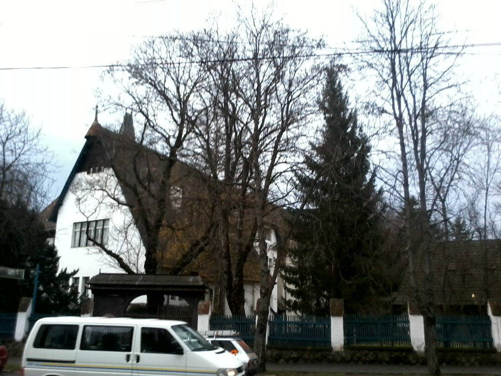 Székely Nemzeti Múzeum - Szekler National Museum